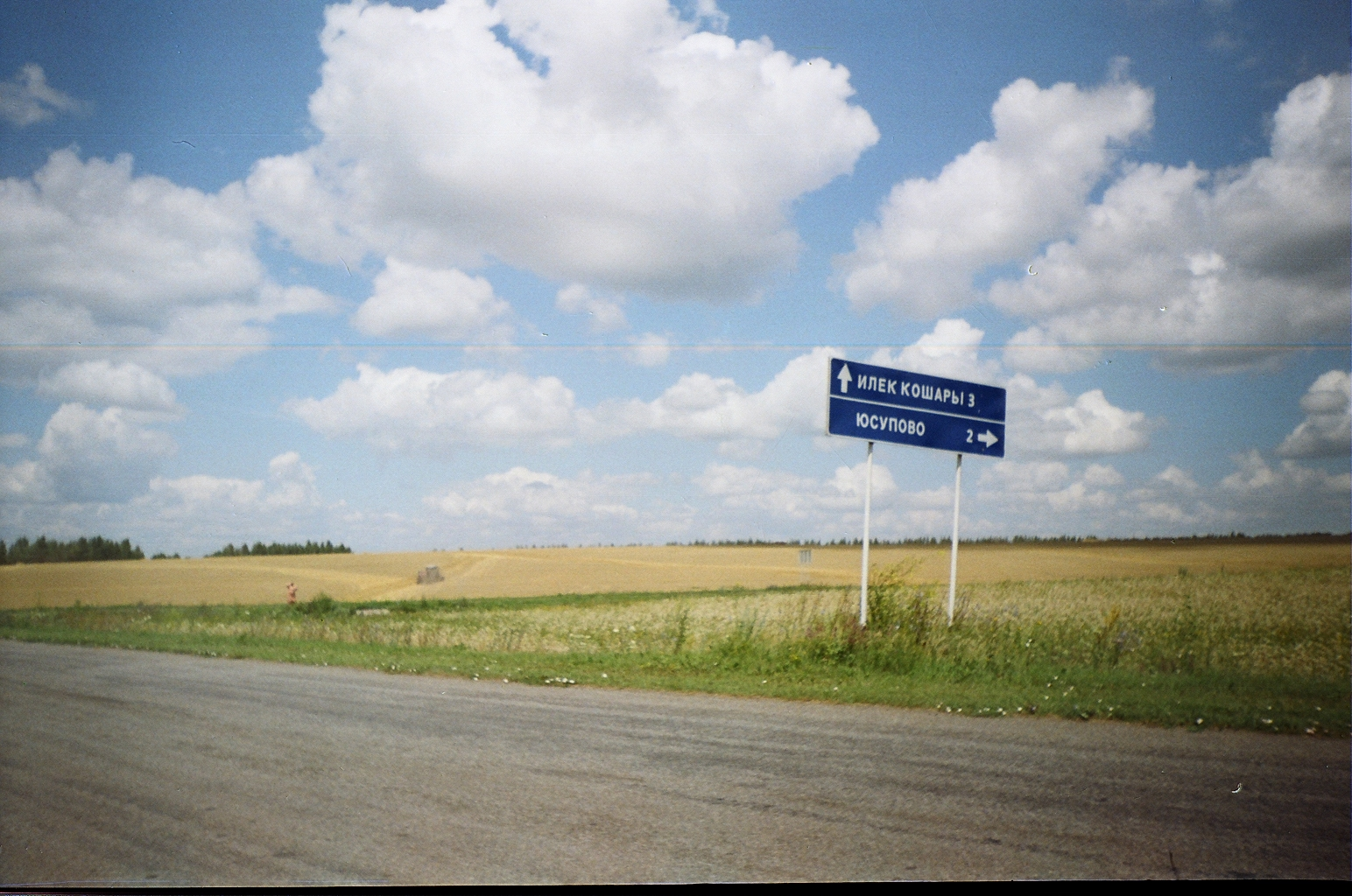 Указатель населённых пунктов Юсупово и Илёк-Кошары в Белгородской области, 2007